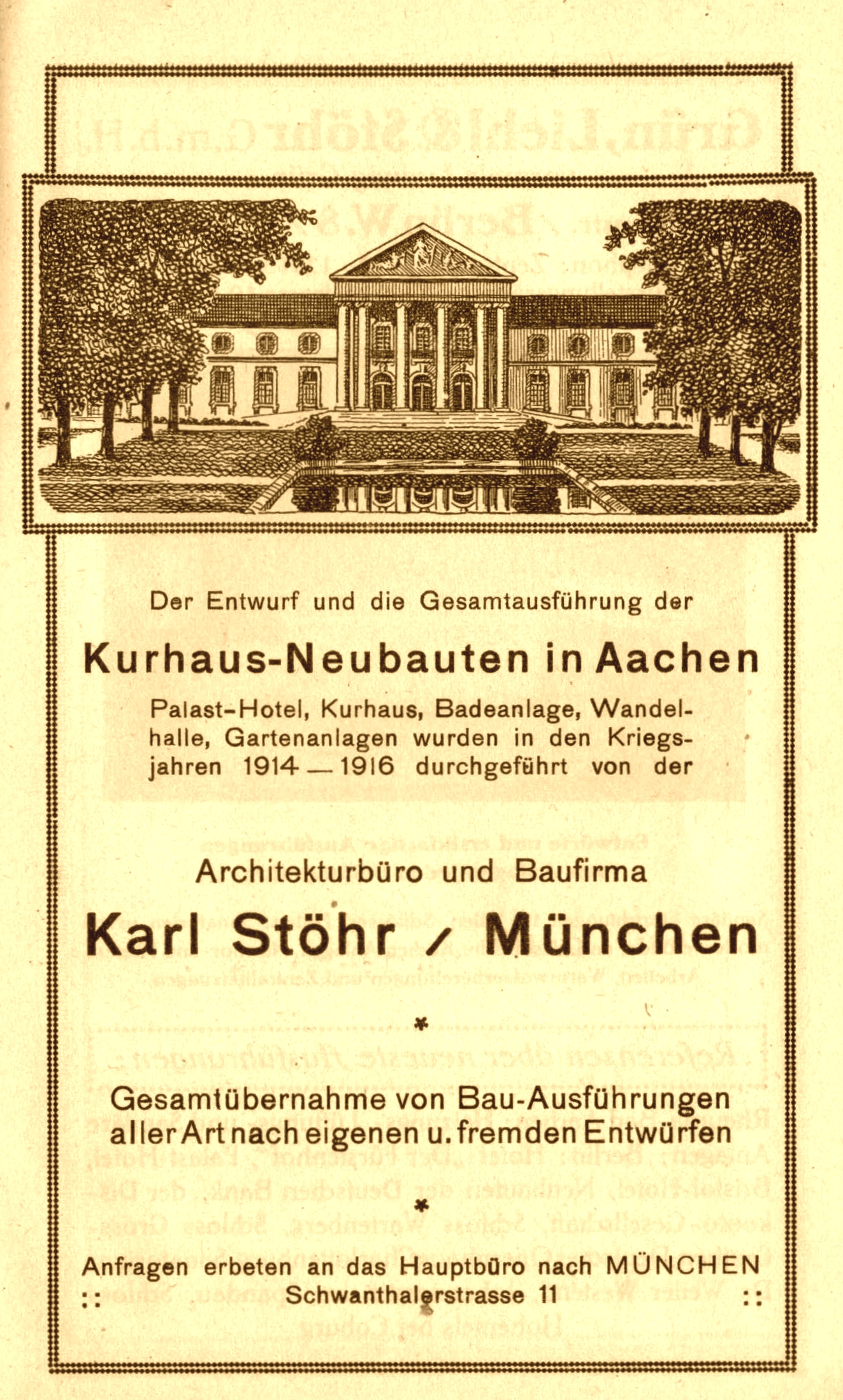 Anzeige des Architekturbüros Stöhr (München) in einer Werbebroschüre der Aktiengeselllschaft für Kur- und Badebetrieb der Stadt Aachen, 1918